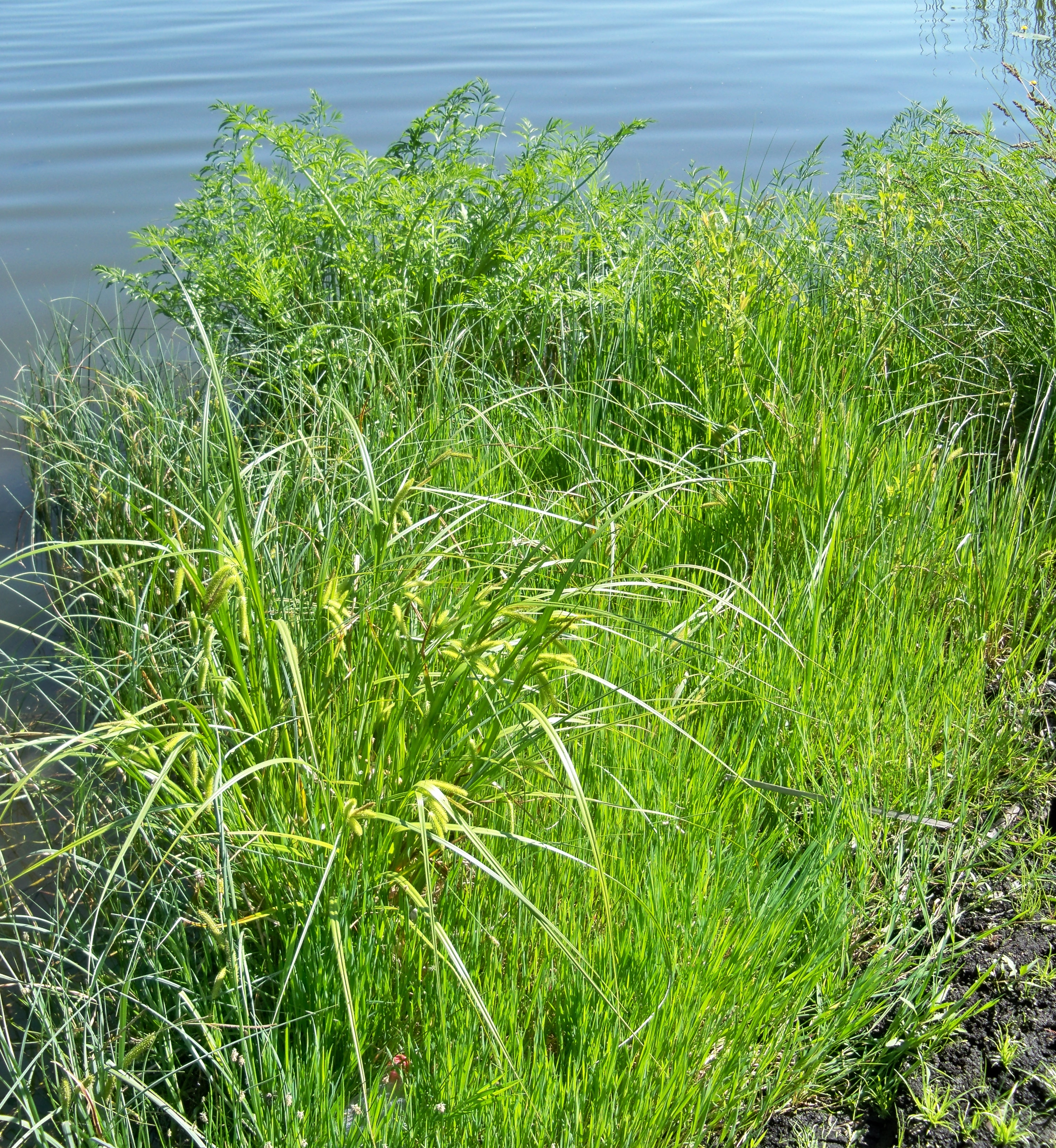 Pło szalejowe Cicuto-Caricetum pseudocyperi nad stawem w Dolinie Zwolenki w Andrzejowie koło rezerwatu Borowiec. Na pierwszym planie turzyca nibyciborowata, na drugim szalej jadowity.